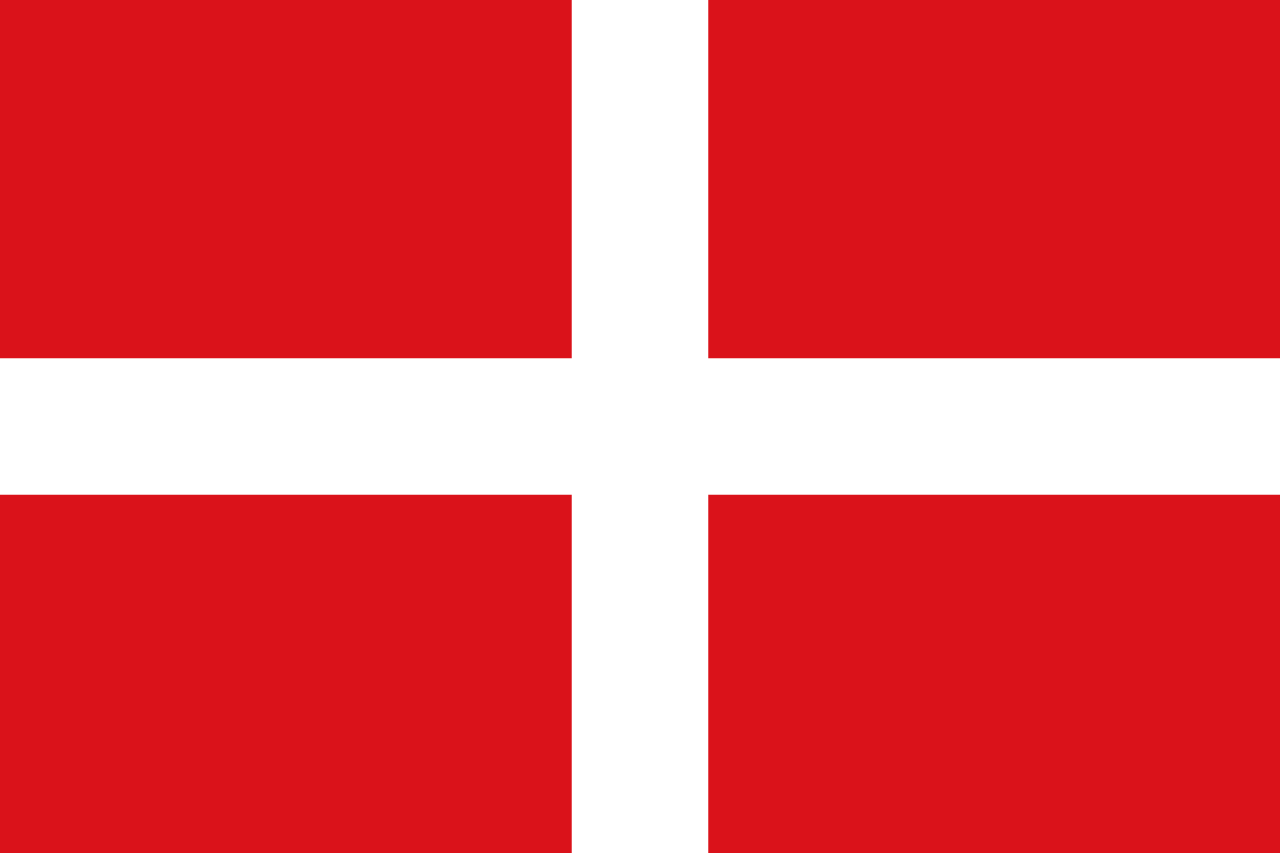 Bandera de la Orden de San Juan